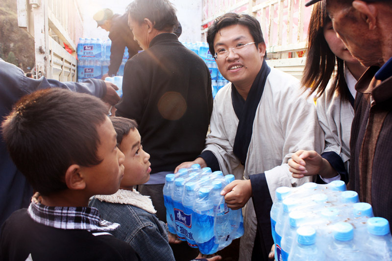 雲南漢服公益活動 雲南漢服向趕上災區提供飲用水